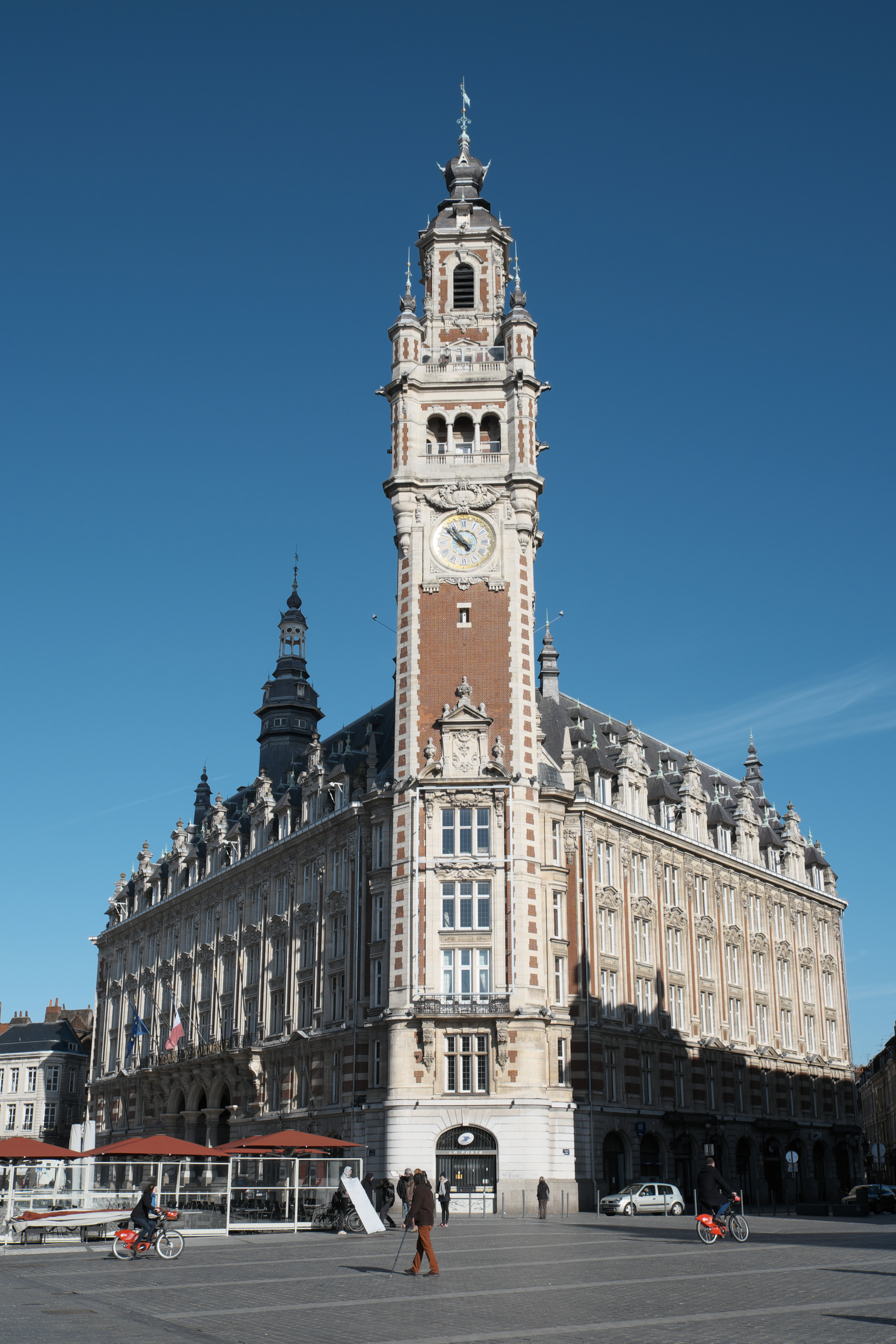 Chambre de commerce in Lille im Département Nord (Hauts-de-France/Frankreich)